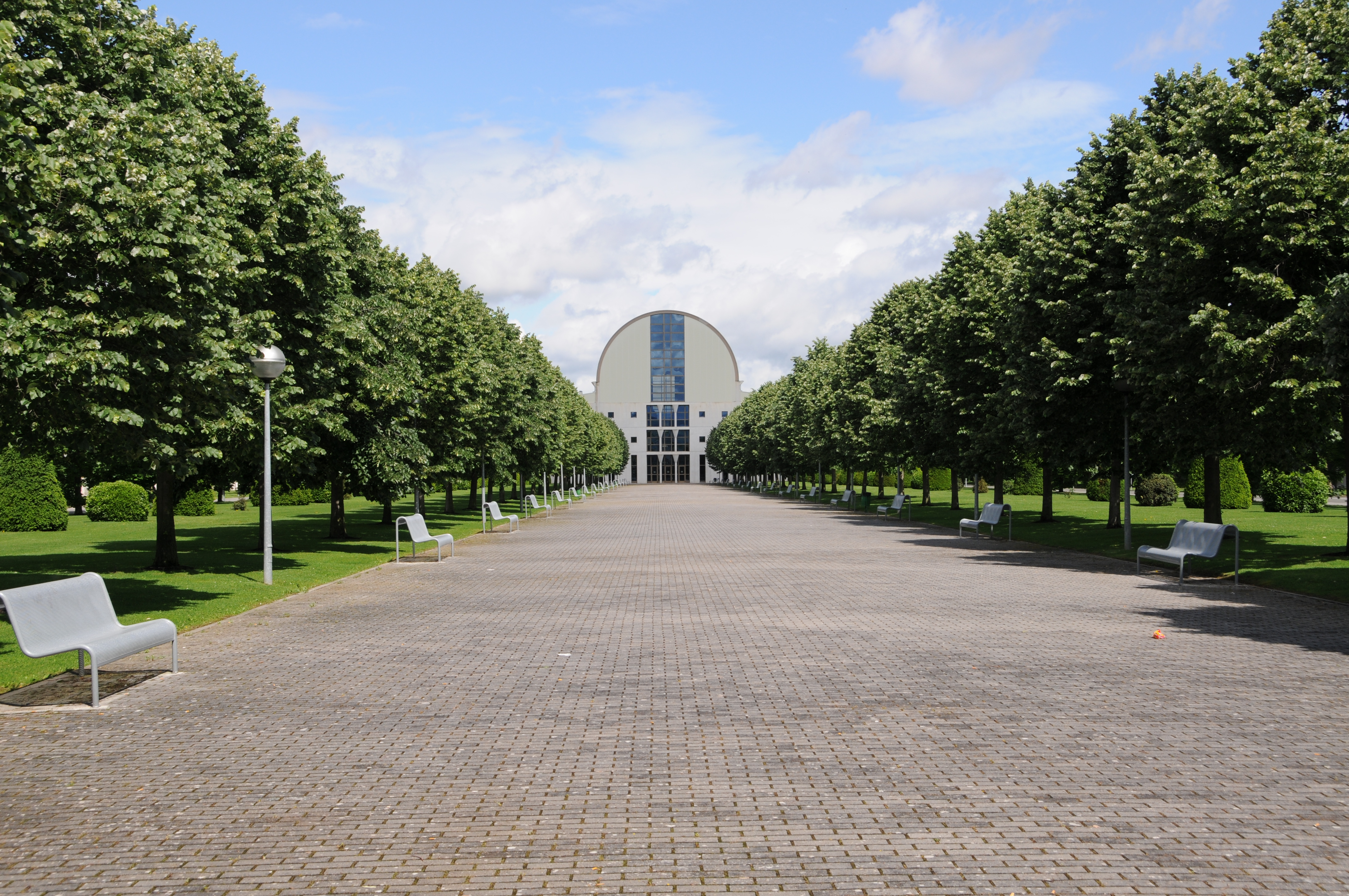 Campus de Arrosadía de la Universidad Pública de Navarra.